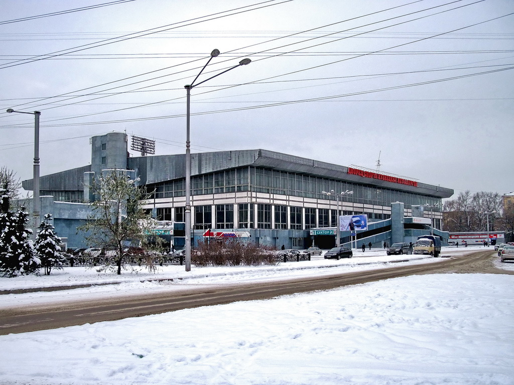 Дворец спорта кузнецких металлургов